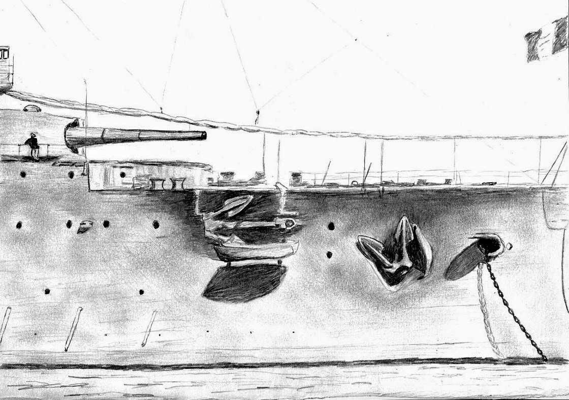 Носовая часть французского броненосца "Буве", рисунок